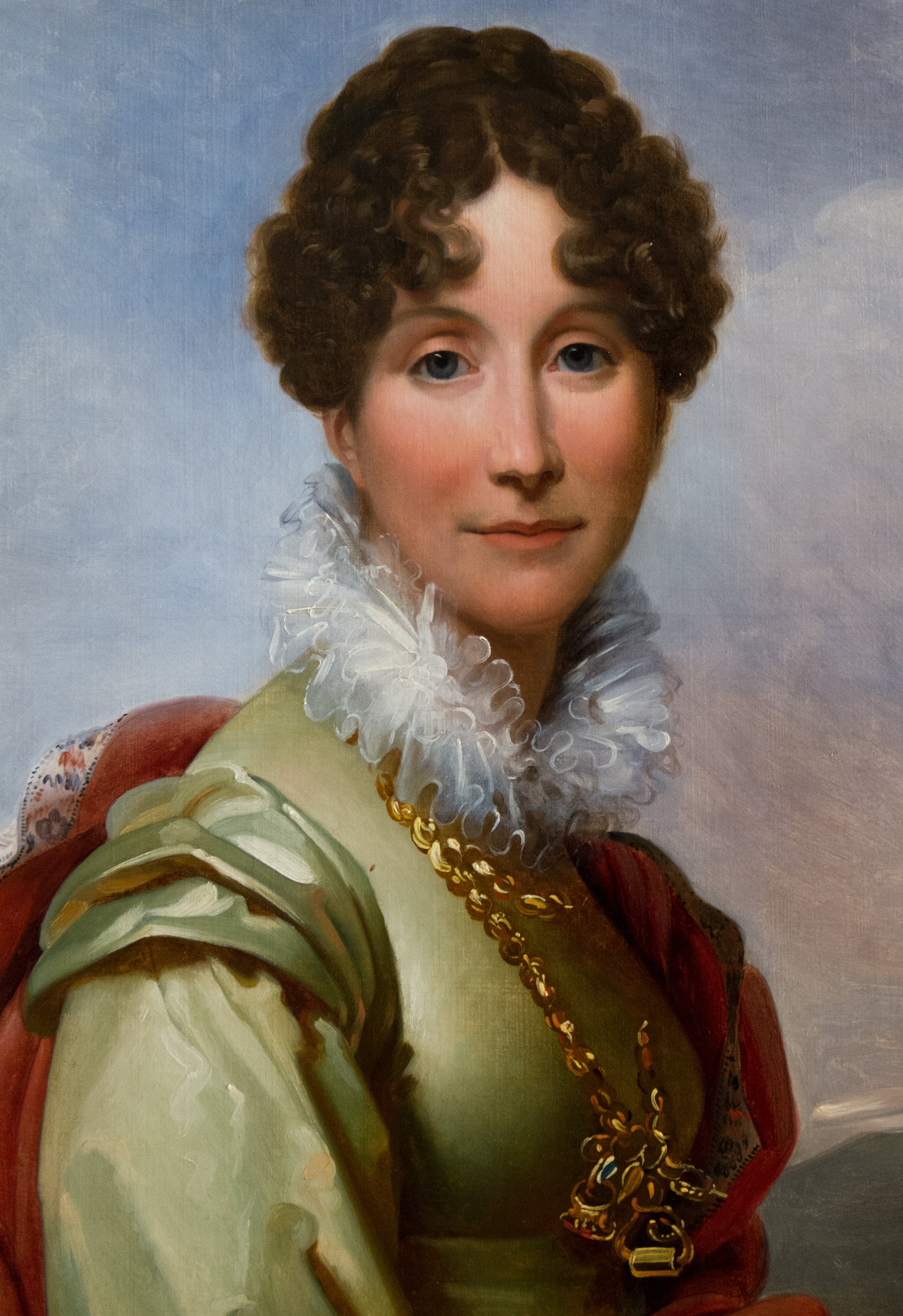 Tableau créé à l'initiative de Louis Philippe Ier destiné au château d'Eu,( copie propriété du CMN). L'original du tableau en pied de Gérard, fut détruit aux Tuileries, à la chute de la monarchie de Juillet